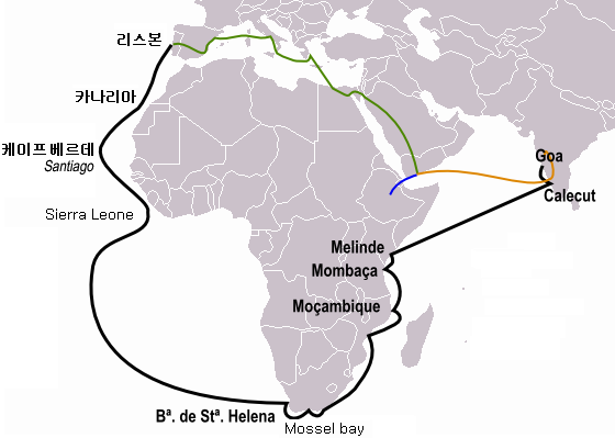 다가마의 1차 원정 항로